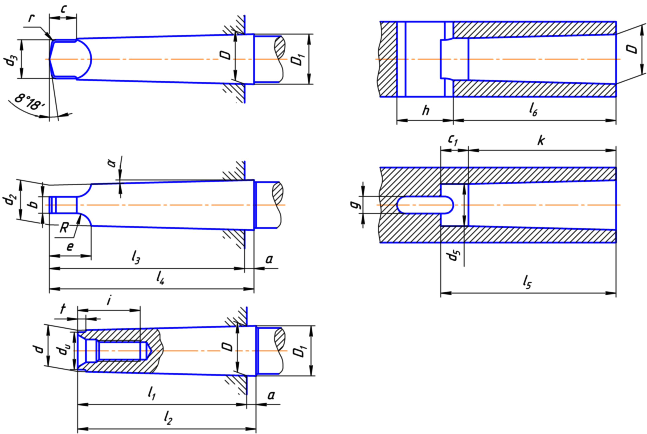 Morse taper, scheme